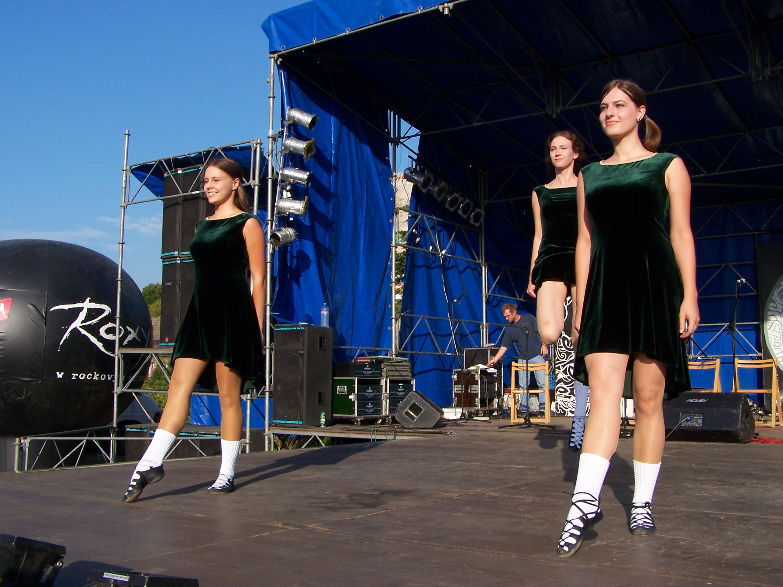 Występ zespołu Ellorien podczas Festiwalu Muzyki Celtyckiej "Zamek" w Będzinie.